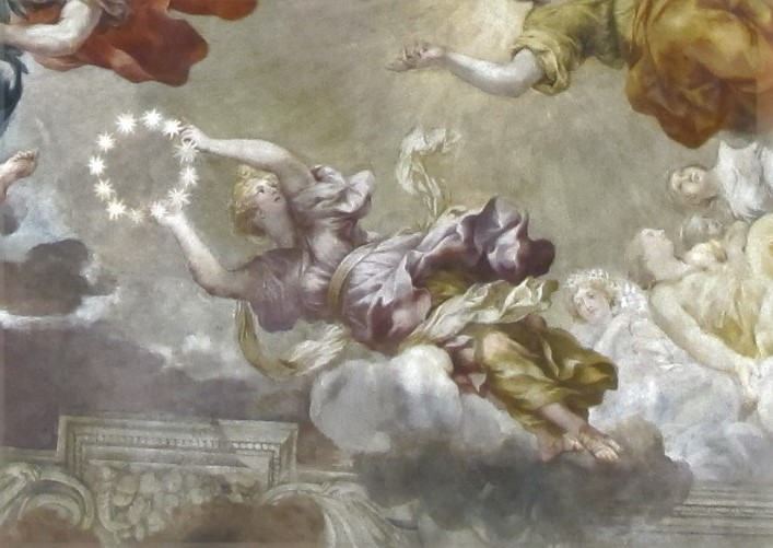 Maria Immaculata im Salone di Pietro da Cortona im Palazzo Barberini, Rom